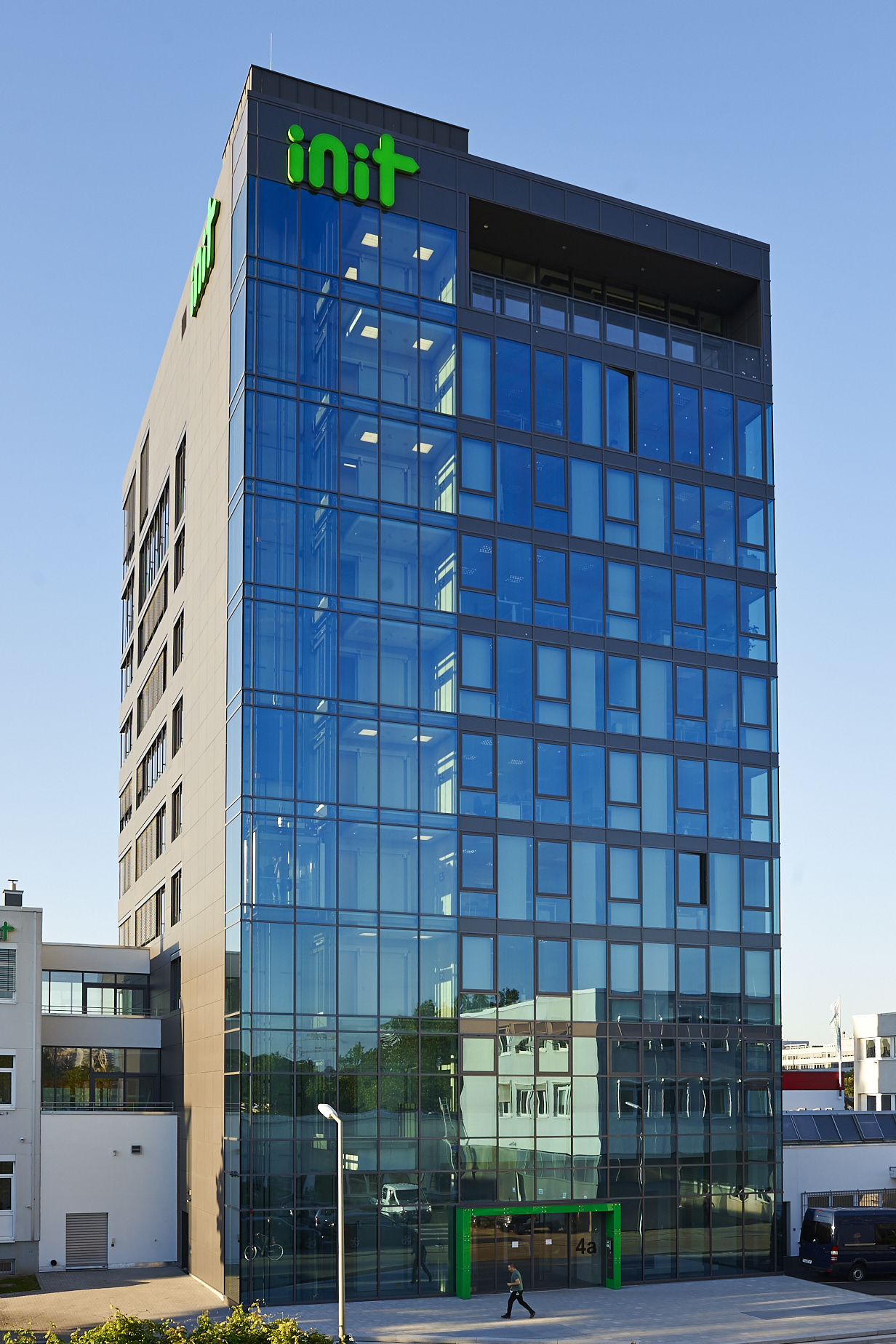 Firmengebäude der init innovation in traffic systems AG in Karlsruhe